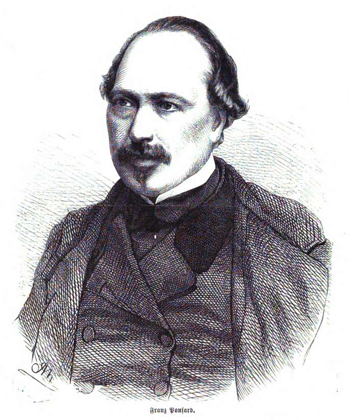 François Ponsard, französischer Dramatiker im 19. Jh.